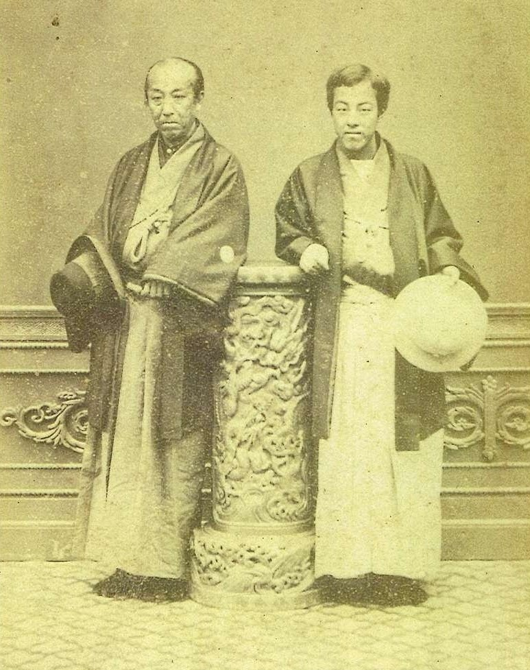 吉井信謹(右)と実父上杉斉憲(左)の写真。